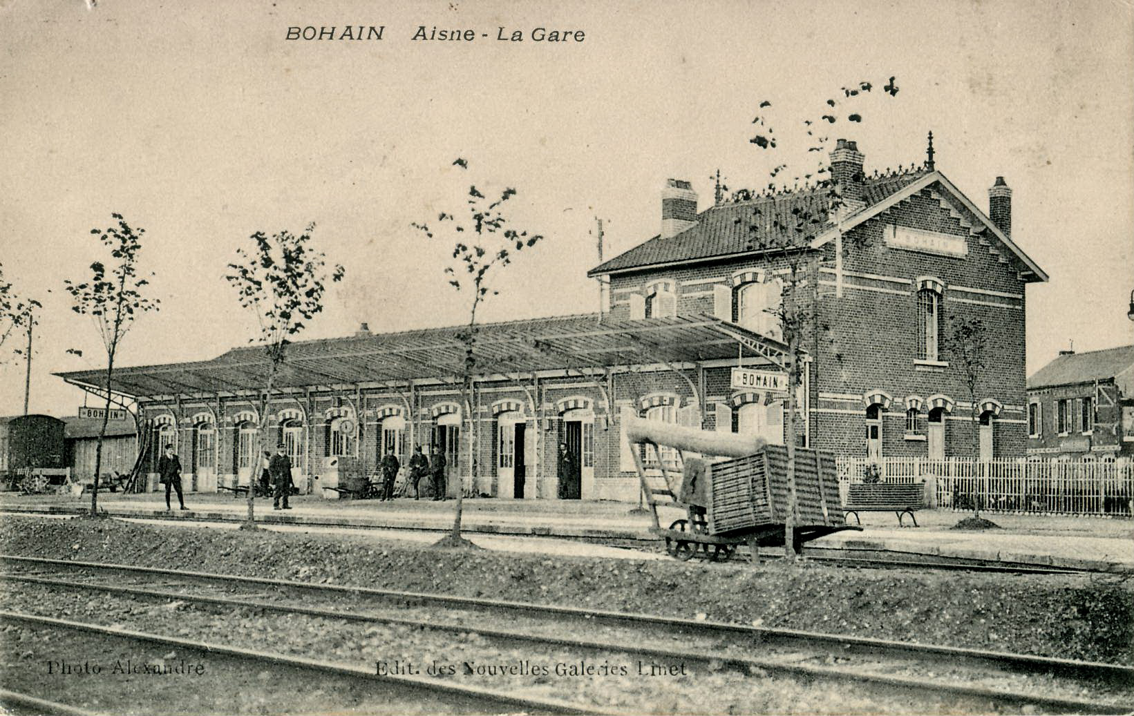 Carte postale ancienne éditée par les nouvelles galeries Linet BOHAIN (Aisne) : la Gare